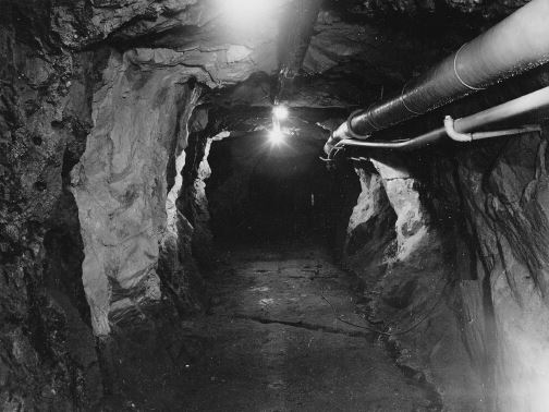 Atlas Copco: Provgruvan 20 meter under jord i Sickla Industriområde.